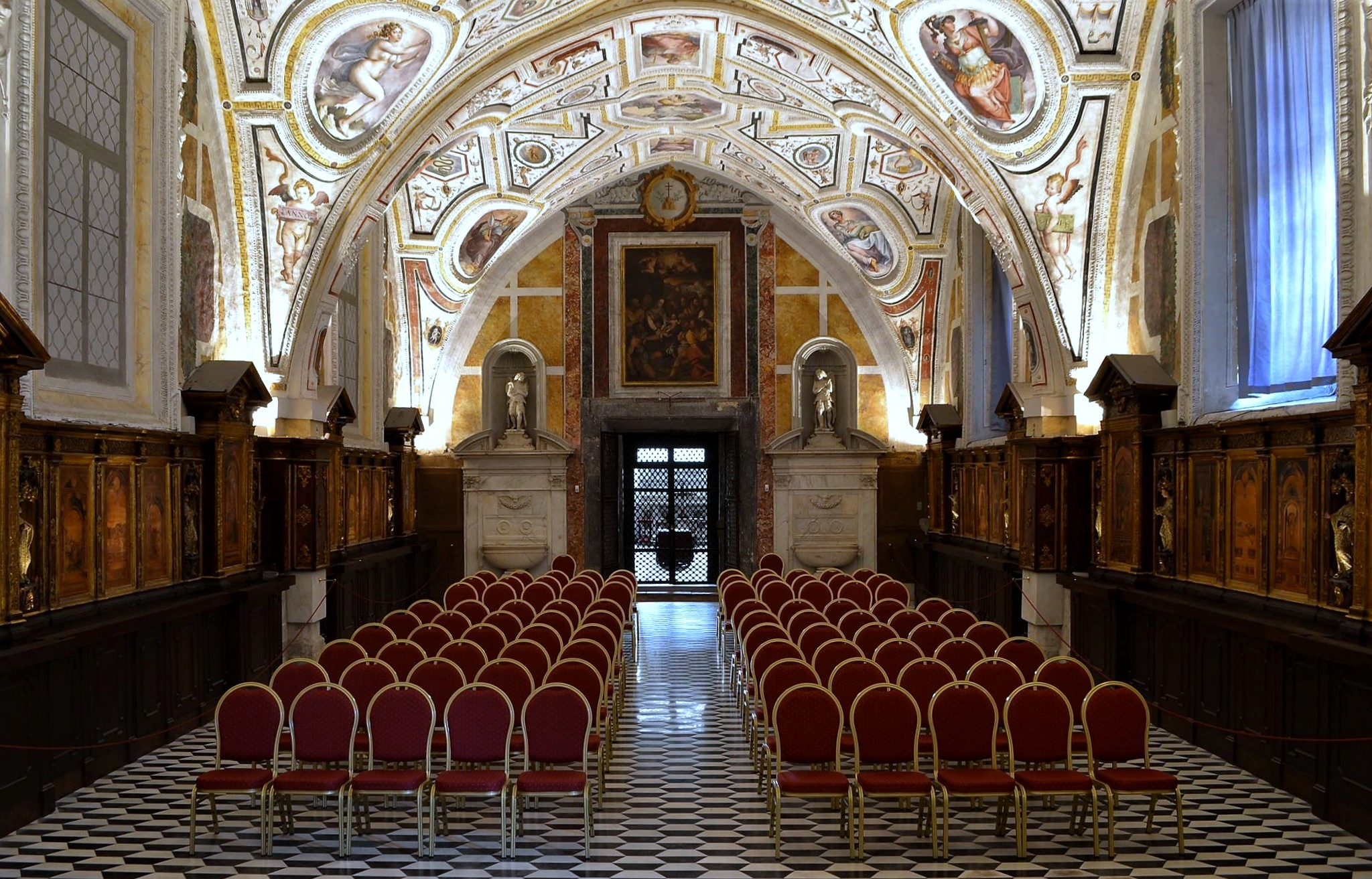 Chiesa di Sant'Anna dei Lombardi. Sacrestia affrescata da Giorgio Vasari e aiuti. Controfacciata.